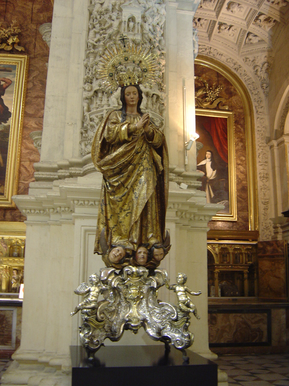 La Inmaculada Concepción de Alonso Martinez, que según algunos autores fue tallada por este escultor en 1658 o hacia 1657, según otros, es una obra conservada y expuesta en la Sacristía mayor de la catedral de Sevilla, (España).